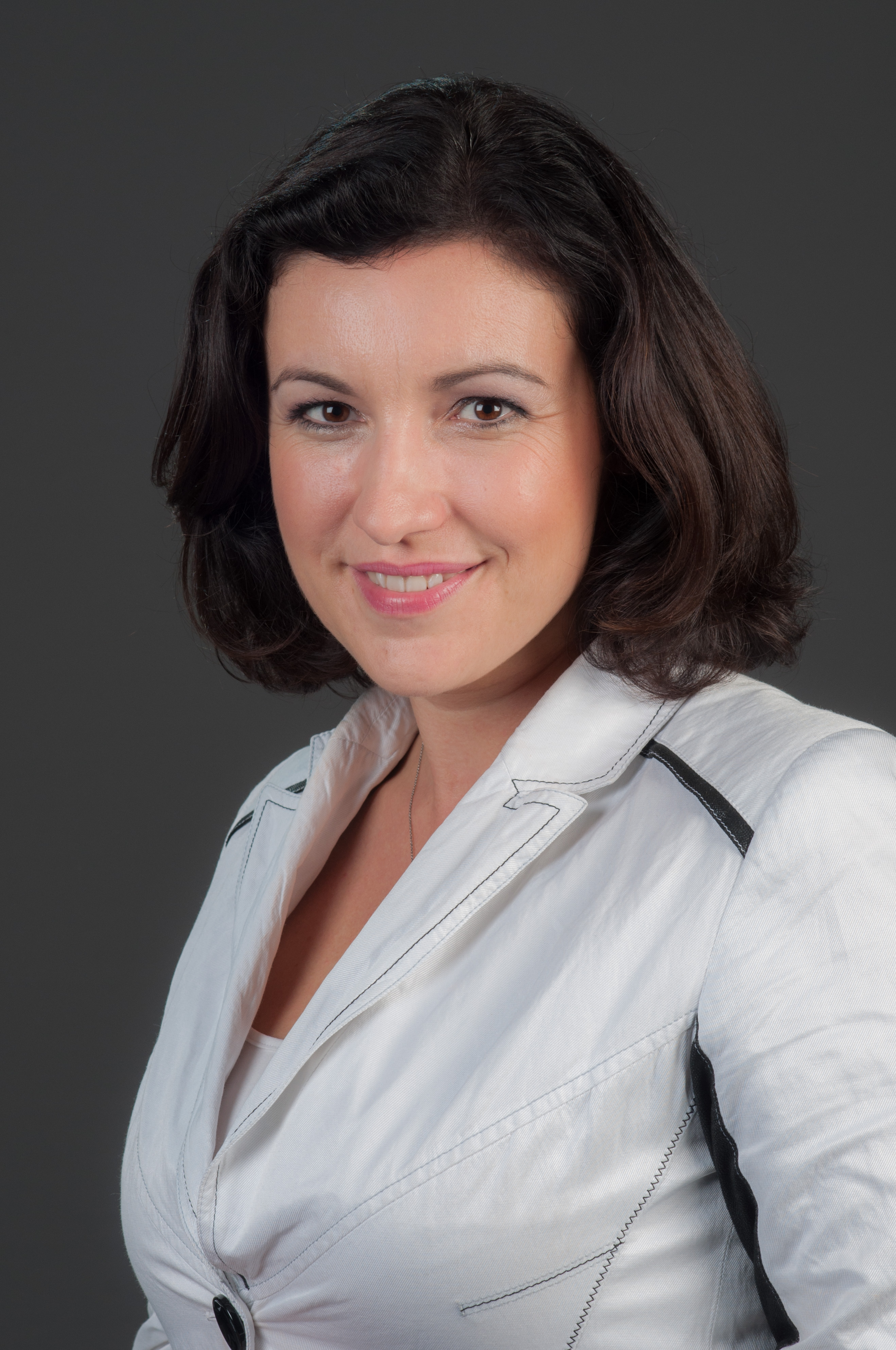 Dorothee Bär (CSU), MdB